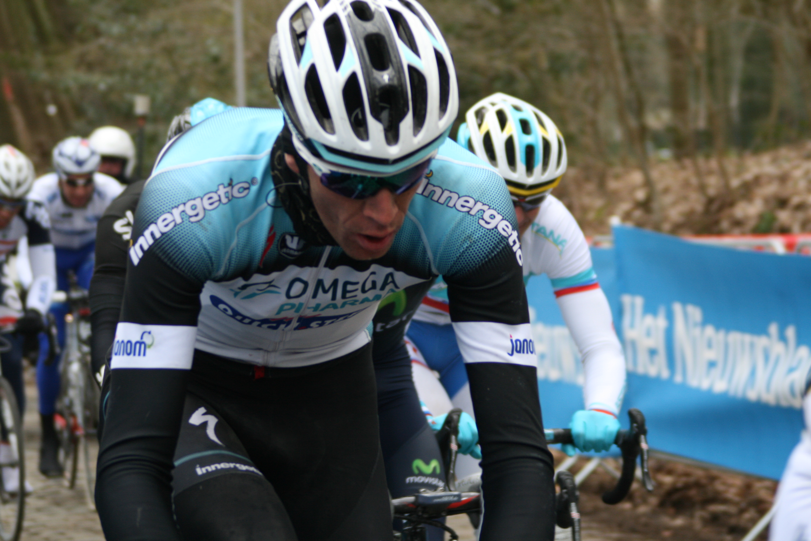 Gent-Wevelgem 2013, Kemmelberg